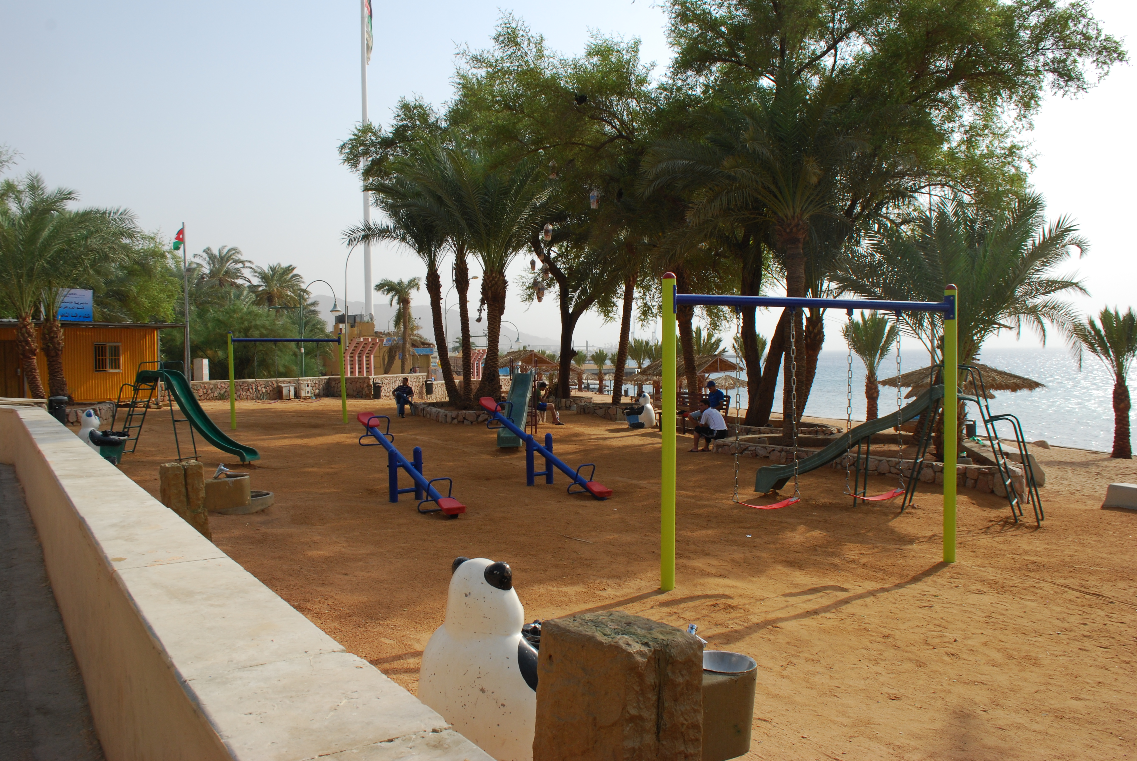 Aqaba : plaine de jeux pour enfants, sur la promenade du front de mer.